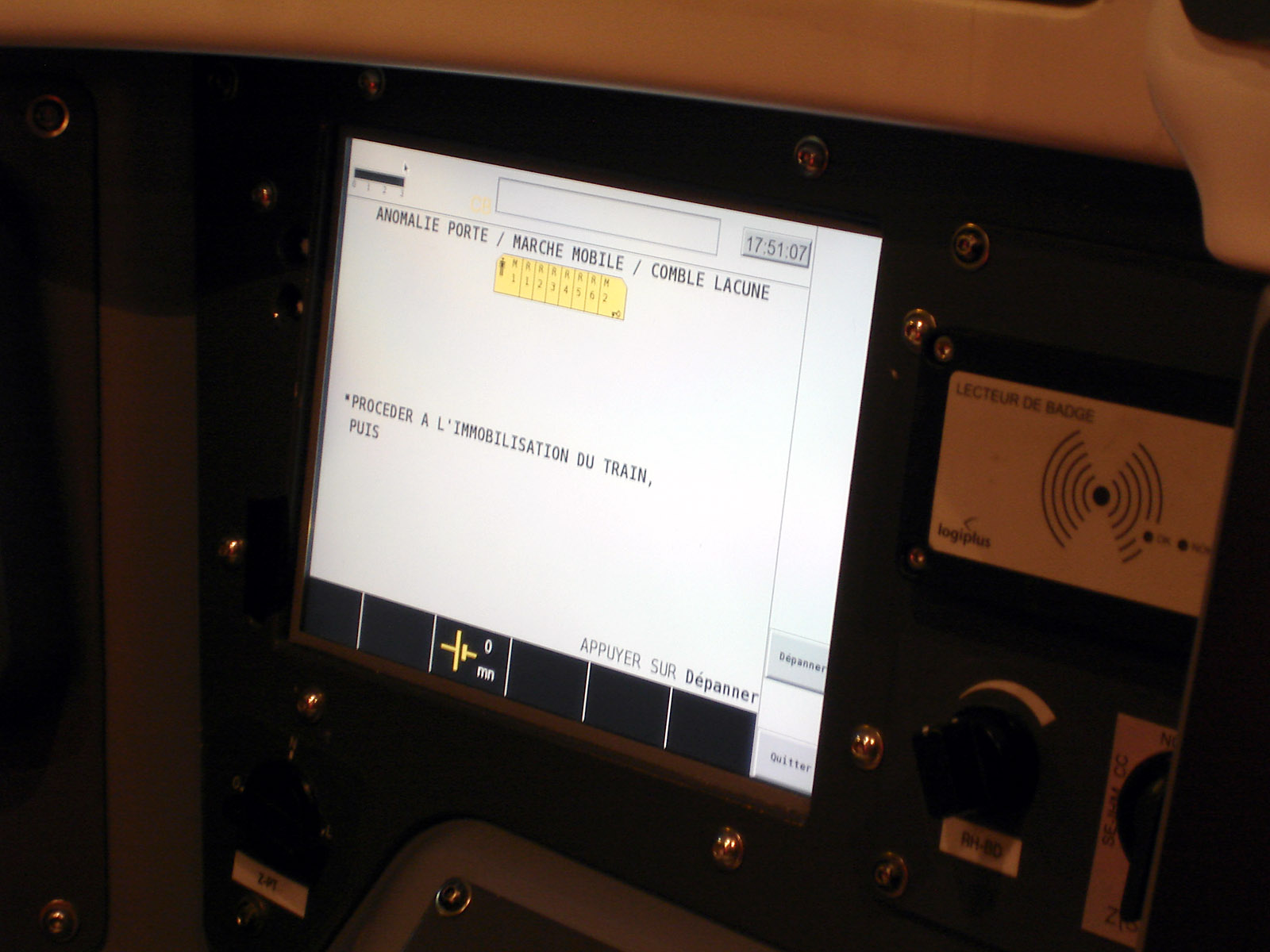 Poste de conduite d'une Z 50000 au technicentre Paris Nord-Joncherolles, Villetaneuse, Seine-Saint-Denis, France. Ordinateur de bord (guide de dépannage).